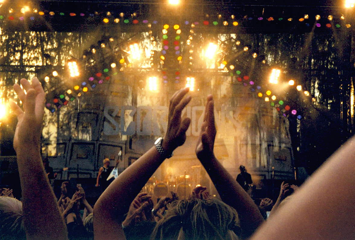 Die Scorpions in Ankkarock, Vantaa, Finnland, 3/8/2003.